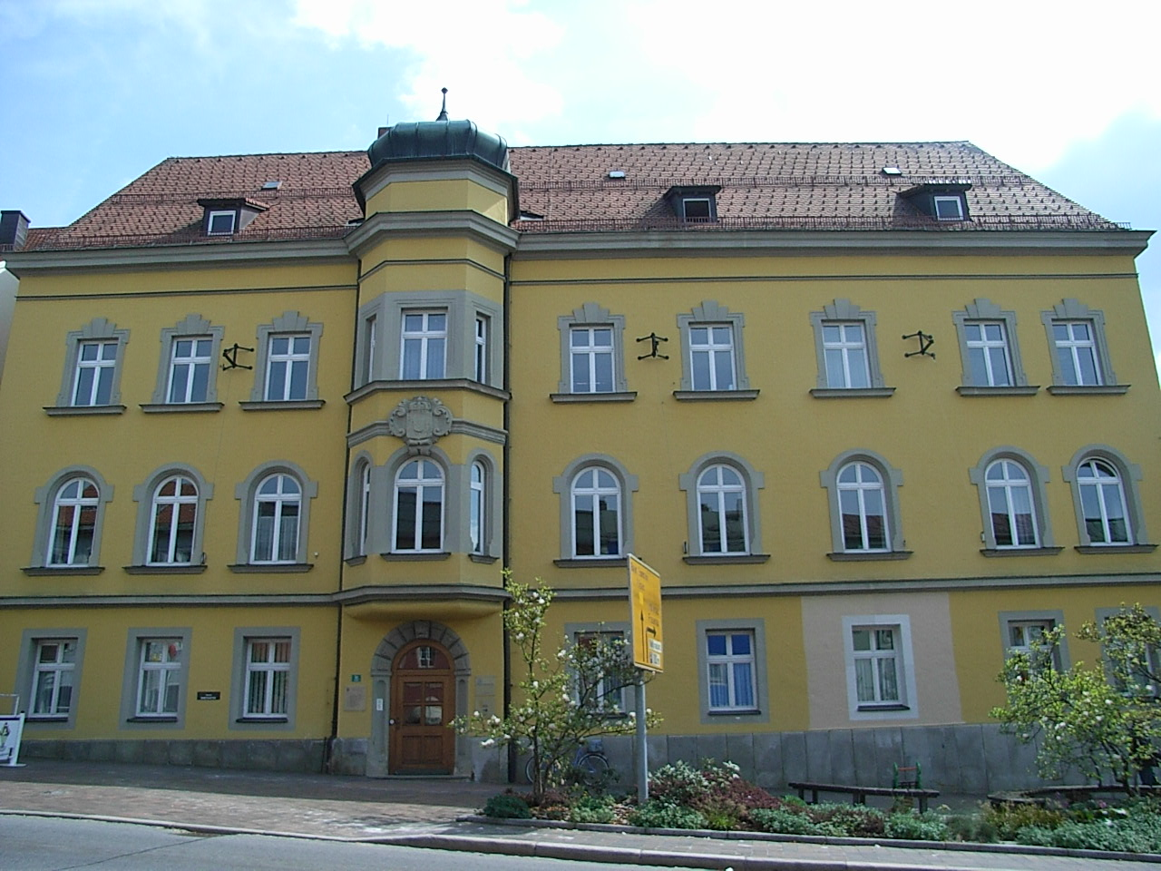 Zwiesel, ehemaliges Landgericht